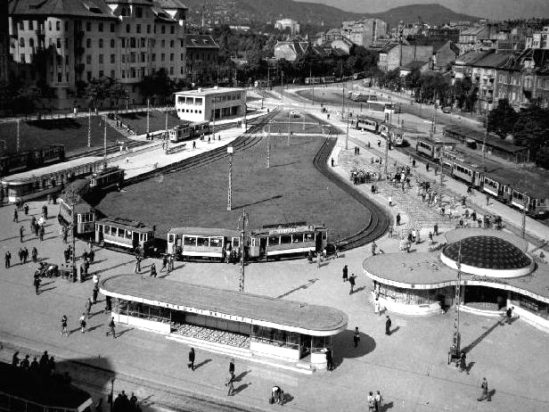 Szél Kálmán tér 1941-ben